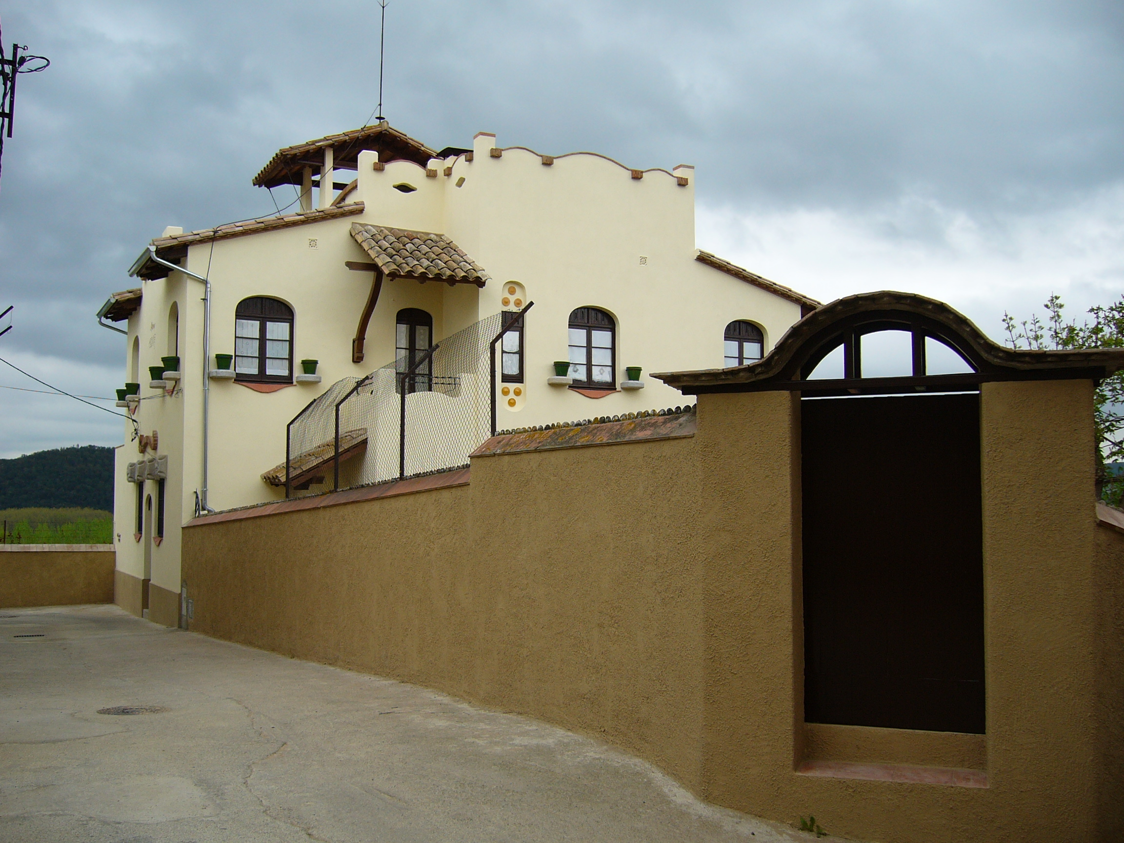 Casa de nova planta encarregada per Faustina Cairó